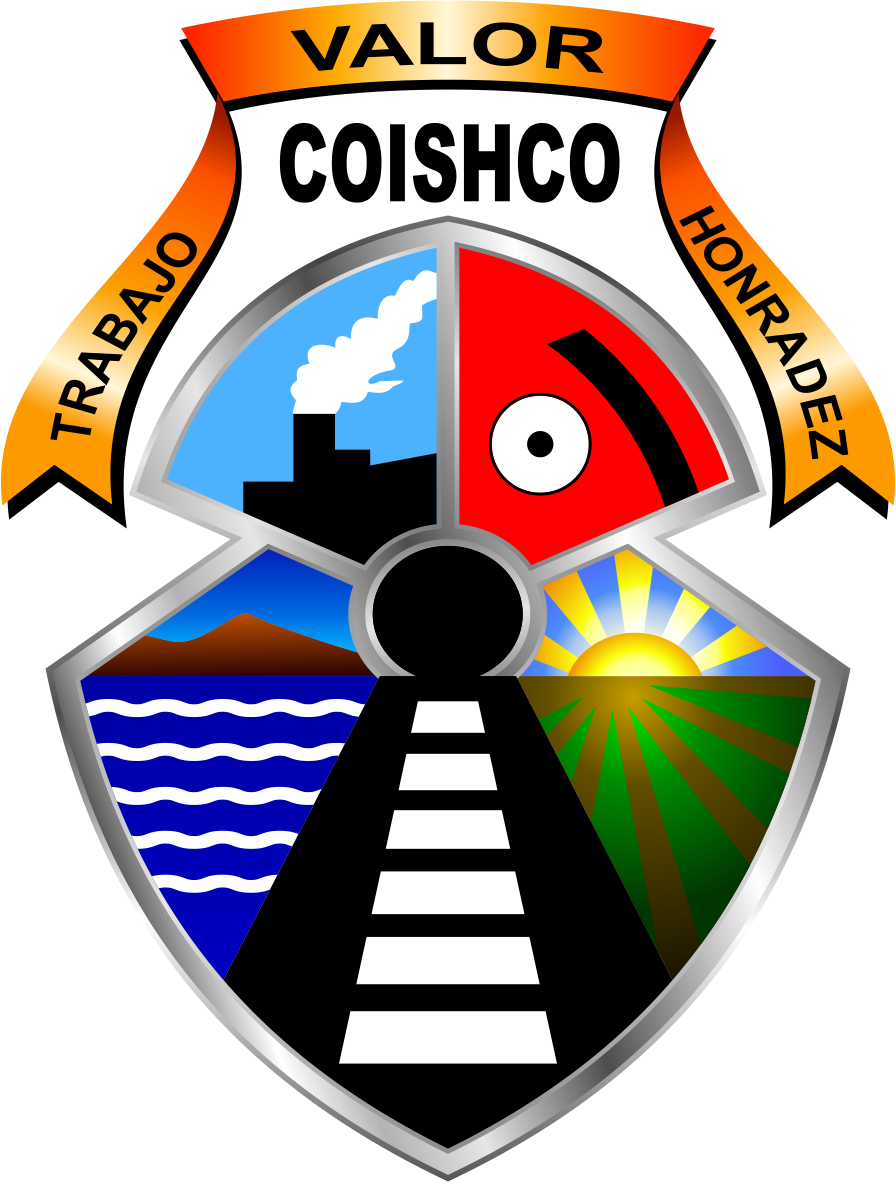 Distrito de Coishco - Provincia del Santa - Región Ancash